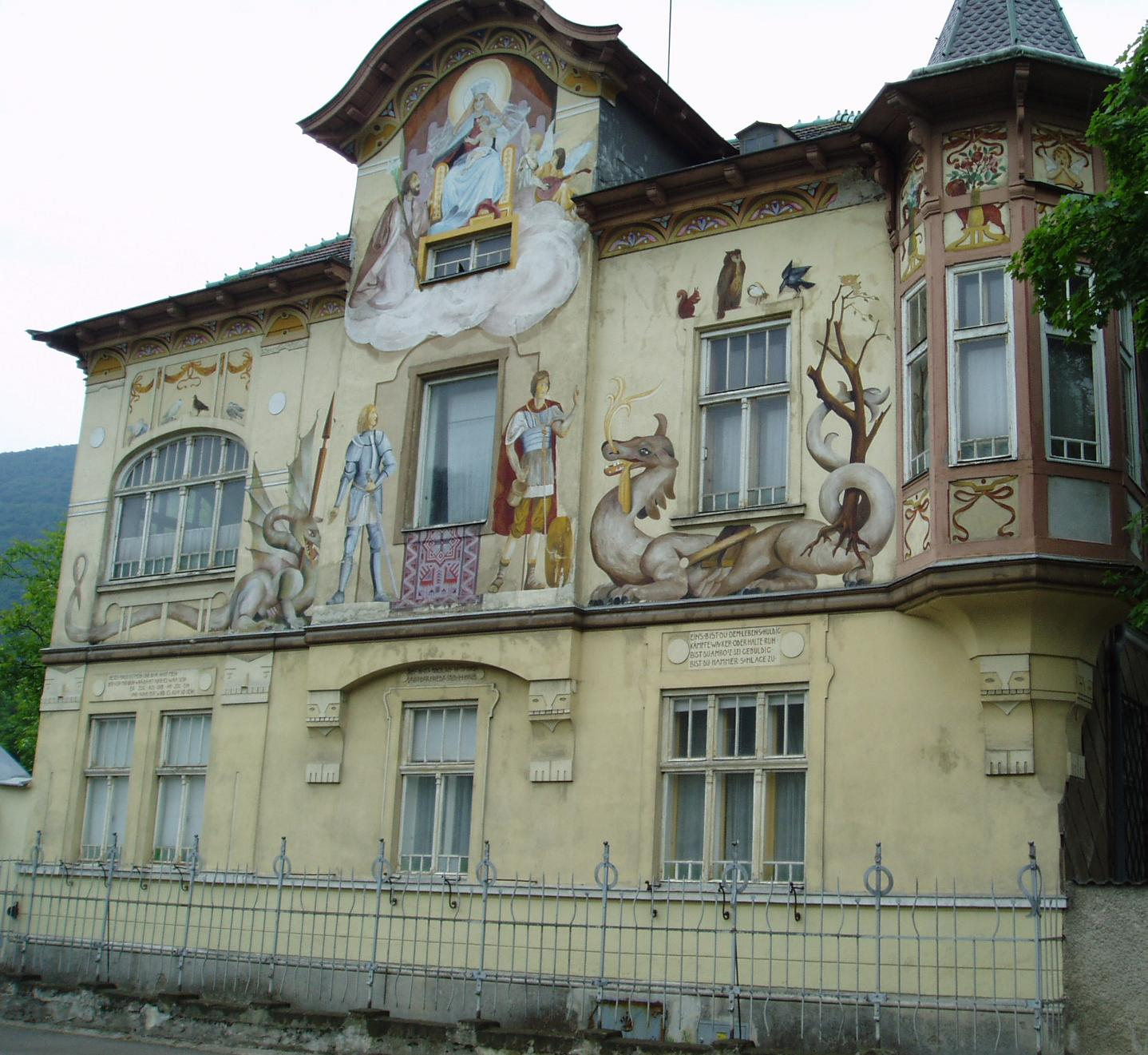 Foto vom 22.Juni 2005 von mir selbst. Kategorie:Bild:Gebäude